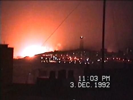 Imagen de videoaficionado durante el naufragio del petrolero Mar Egeo, La Coruña, España. Año 1992.